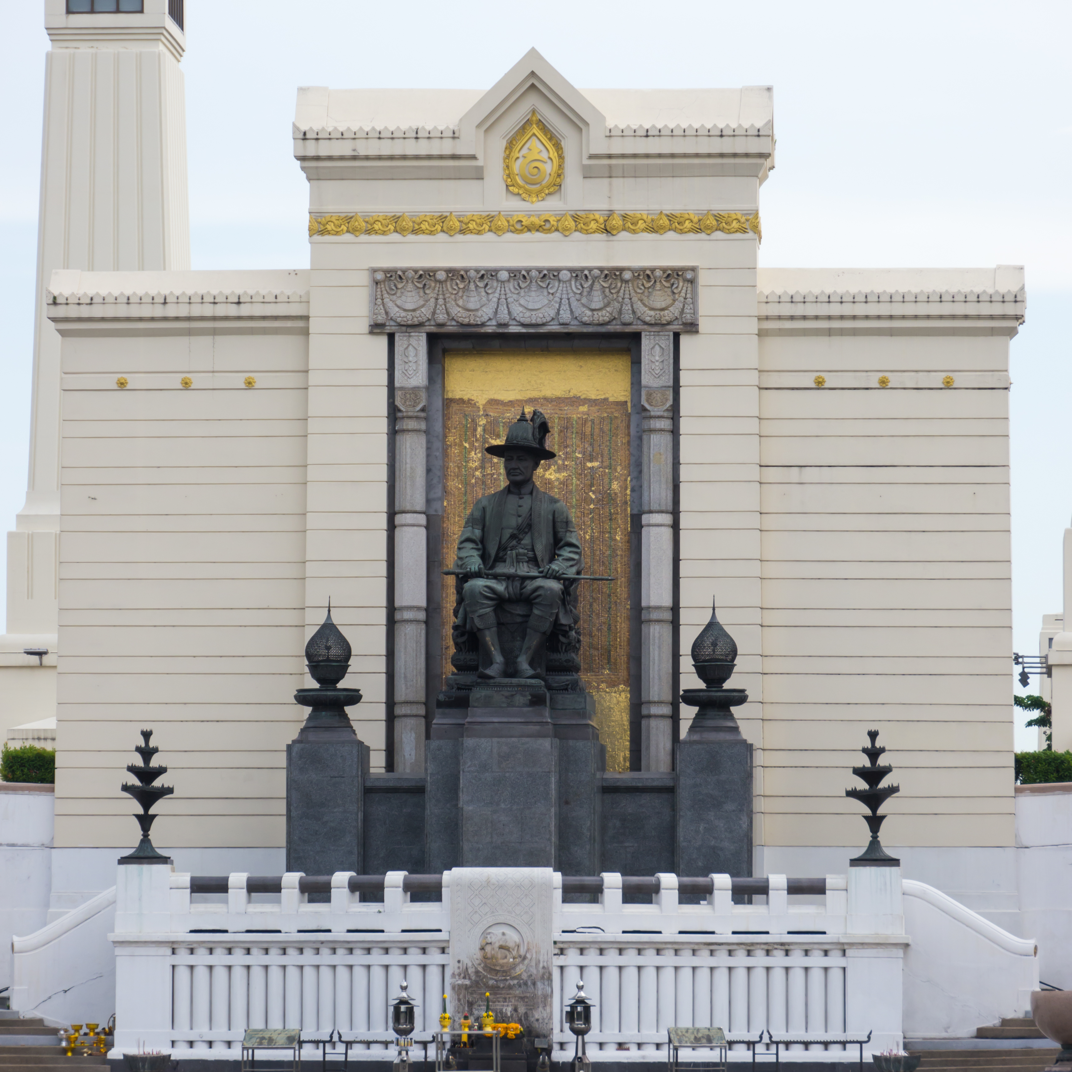 อนุสาวรีย์รัชกาลที่ 1